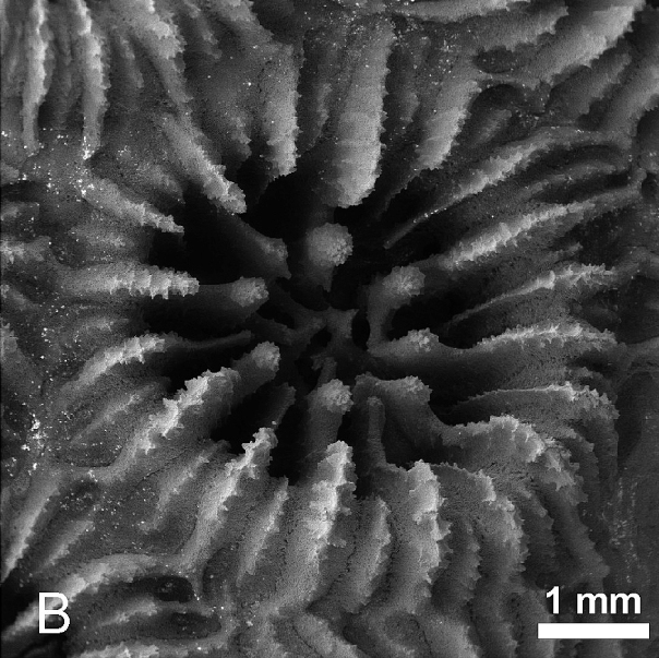 Astrea devantieri - vista superior de coralito. Benzoni et al. (2011) Phylogeny of the coral genus Plesiastrea (Cnidaria, Scleractinia). Contributions to Zoology, 80 (4). Disponible en línea en